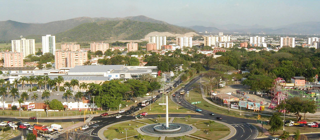 Redoma de San Jacinto Avenida Bolívar Este. Maracay, Edo. Aragua